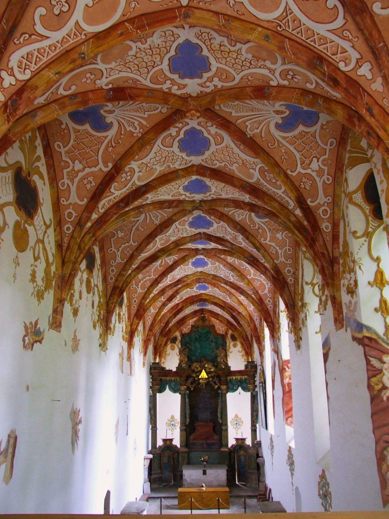 Sklepienie kościoła w Czerwonym Klasztorze na Słowacji